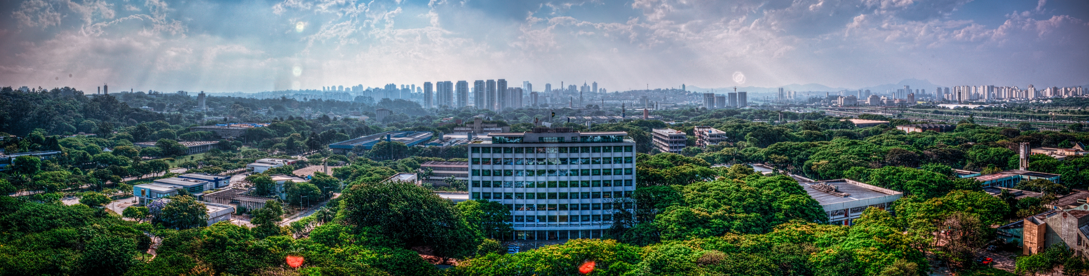 Panorama da Cidade Universitária da Universidade de São Paulo (USP).